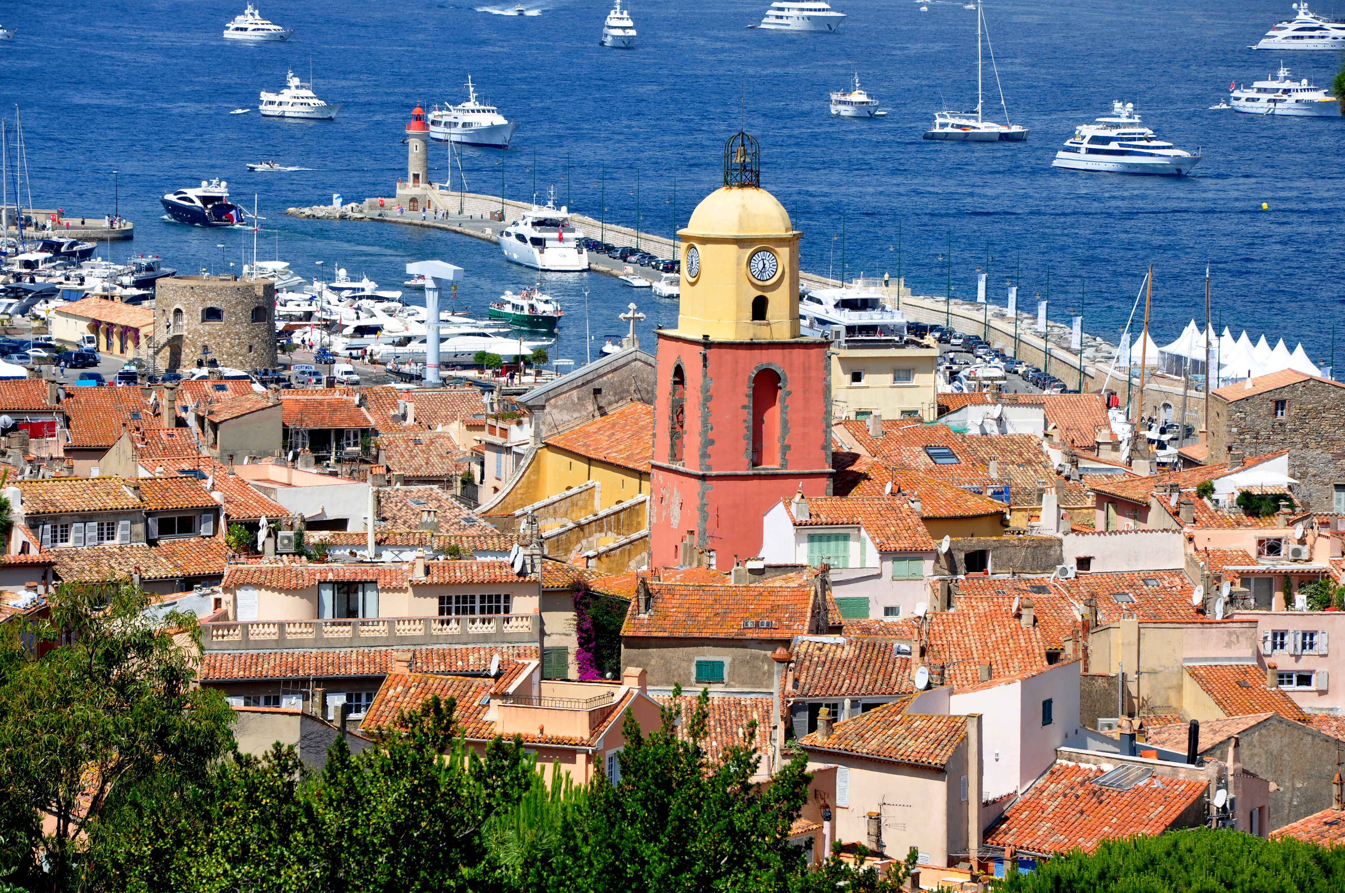 Saint-Tropez - Vue générale